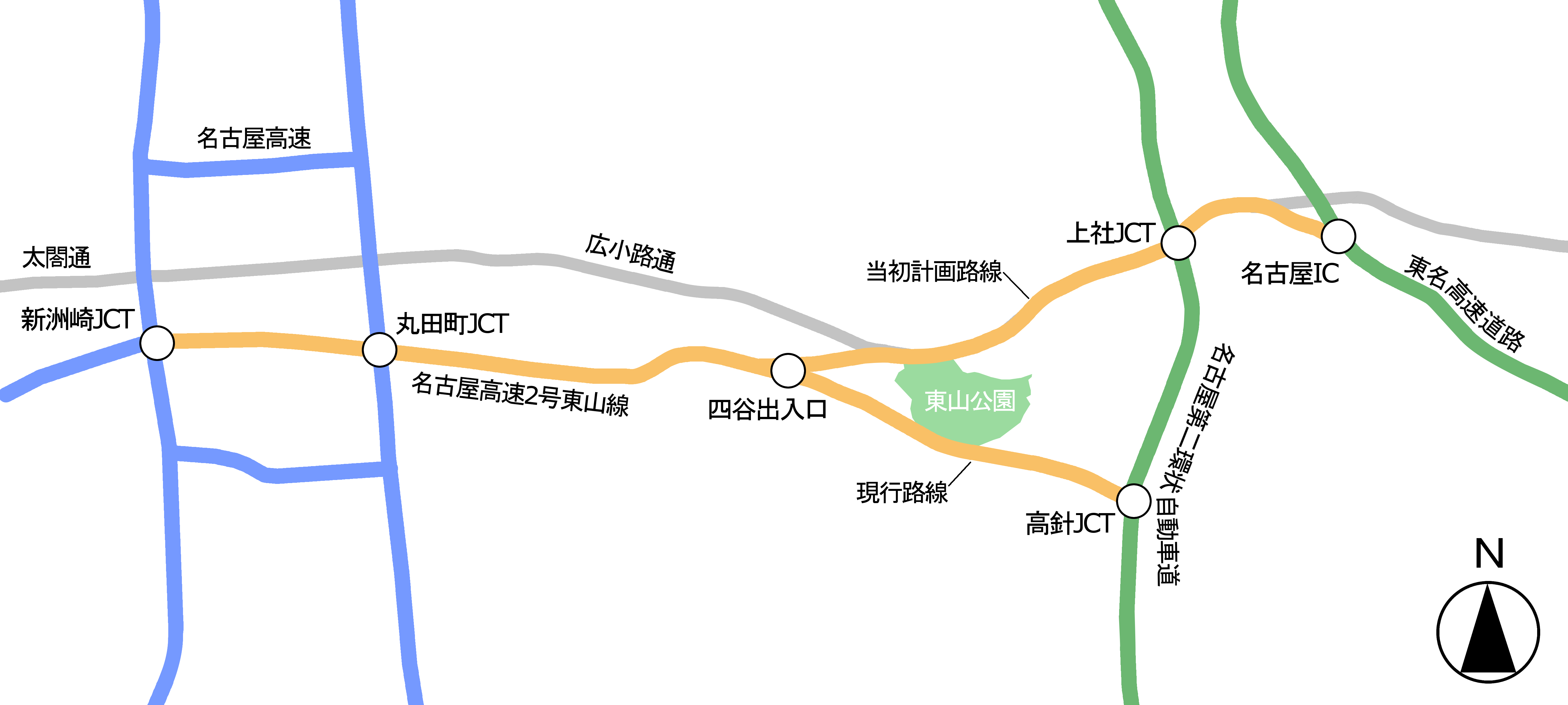 名古屋高速2号東山線 当初計画路線と現行路線の比較